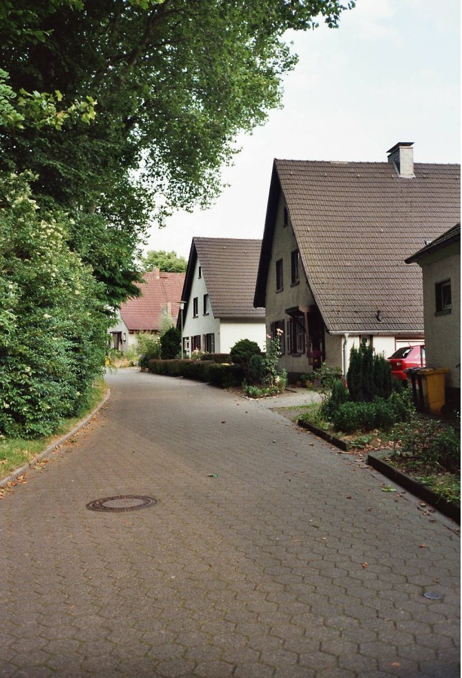 Typische Zechenkolonie im Ruhrgebiet (Dahlhauser Heide), eigenes Bild